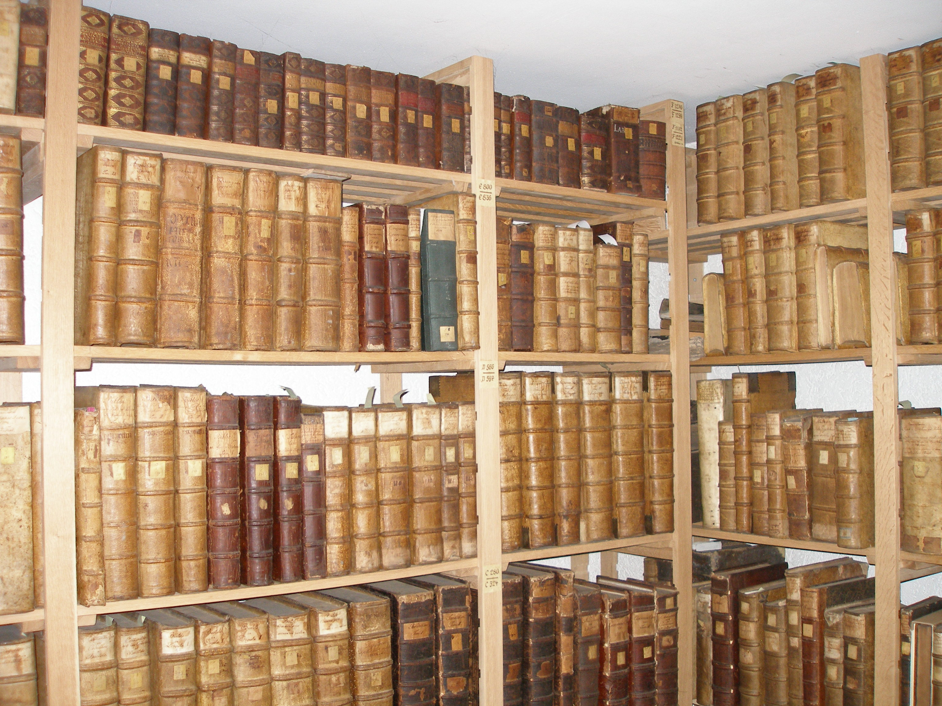 Nikolaus Matz Bibliothek Michelstadt